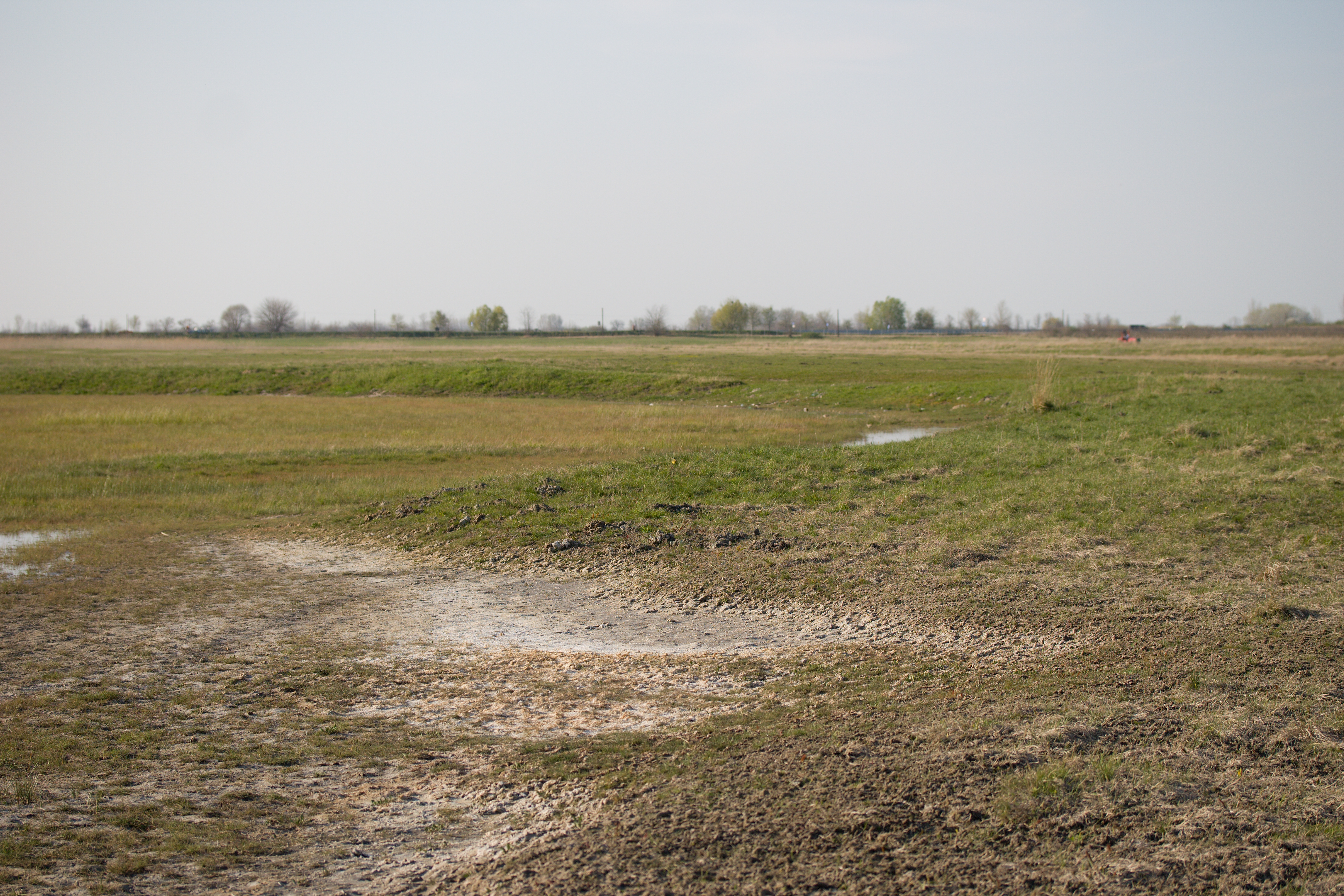 Tipično slatinsko stanište sa vidljivim naslagama soli koje se zadržavaju na površini.